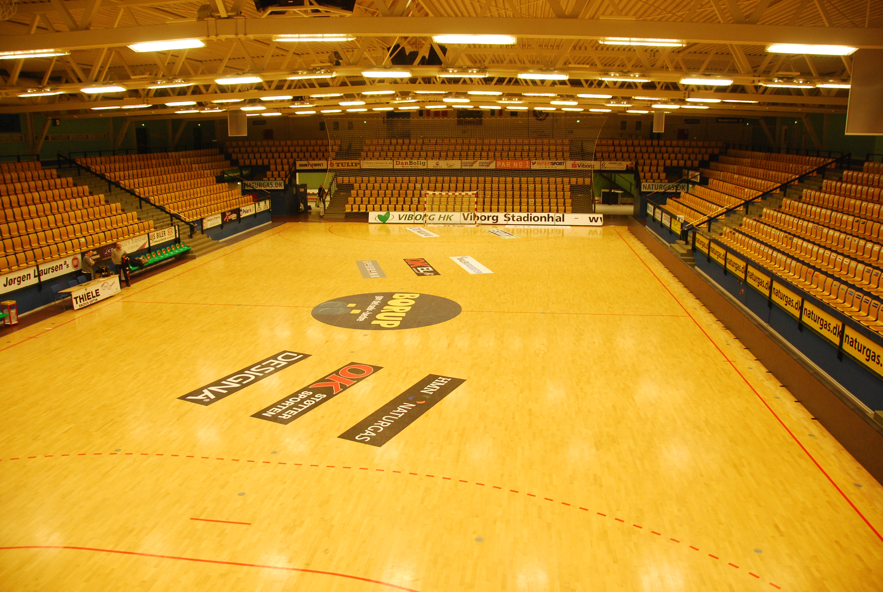 Viborg Stadionhal, hjemmebane for Viborg Håndboldklub.